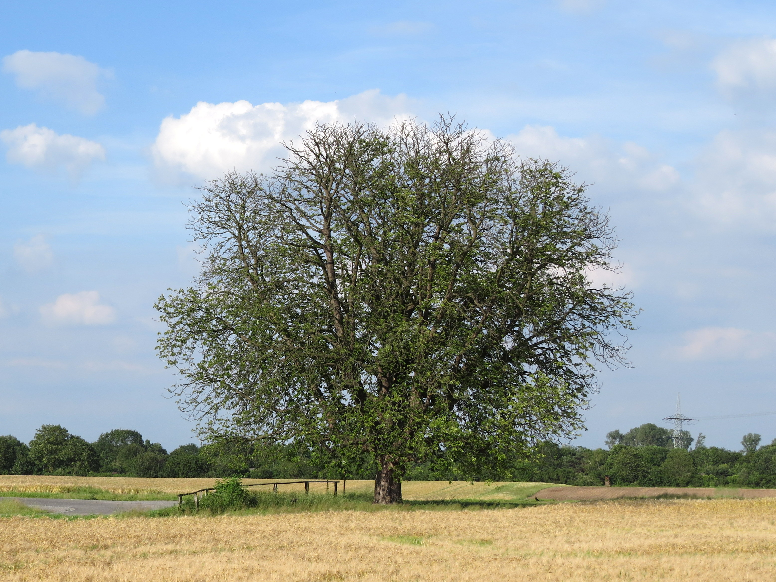 Naturdenkmal Himmelgeister Kastanie, Düsseldorf-Himmelgeist, Nähe Naturschutzgebiet Himmelgeister Rheinbogen (nicht im Bild)